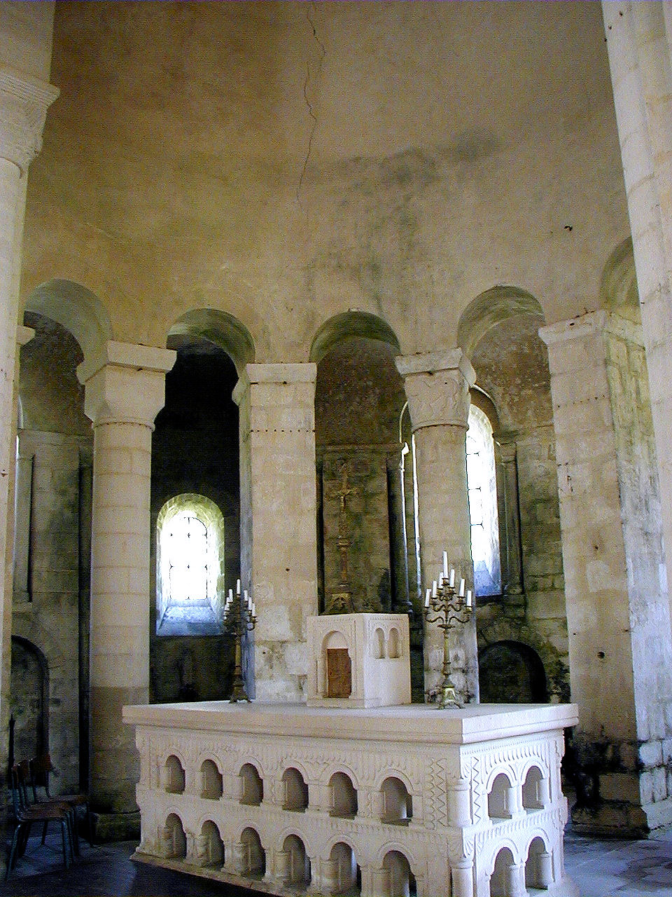 Vignory - Eglise Saint-Etienne - Maître-autel, abside et déambulatoire